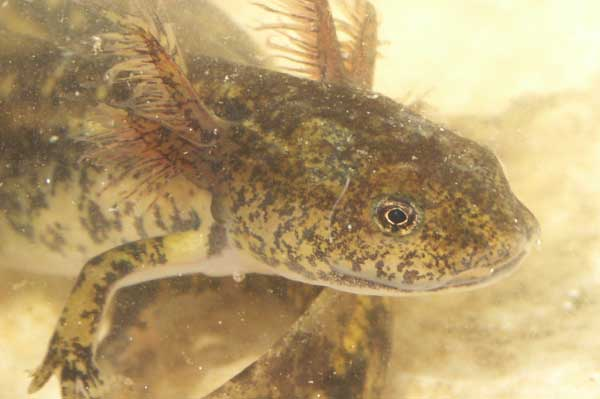 תקריב על חלק גופו הקדמי של ראשן סלמנדרה מצויה